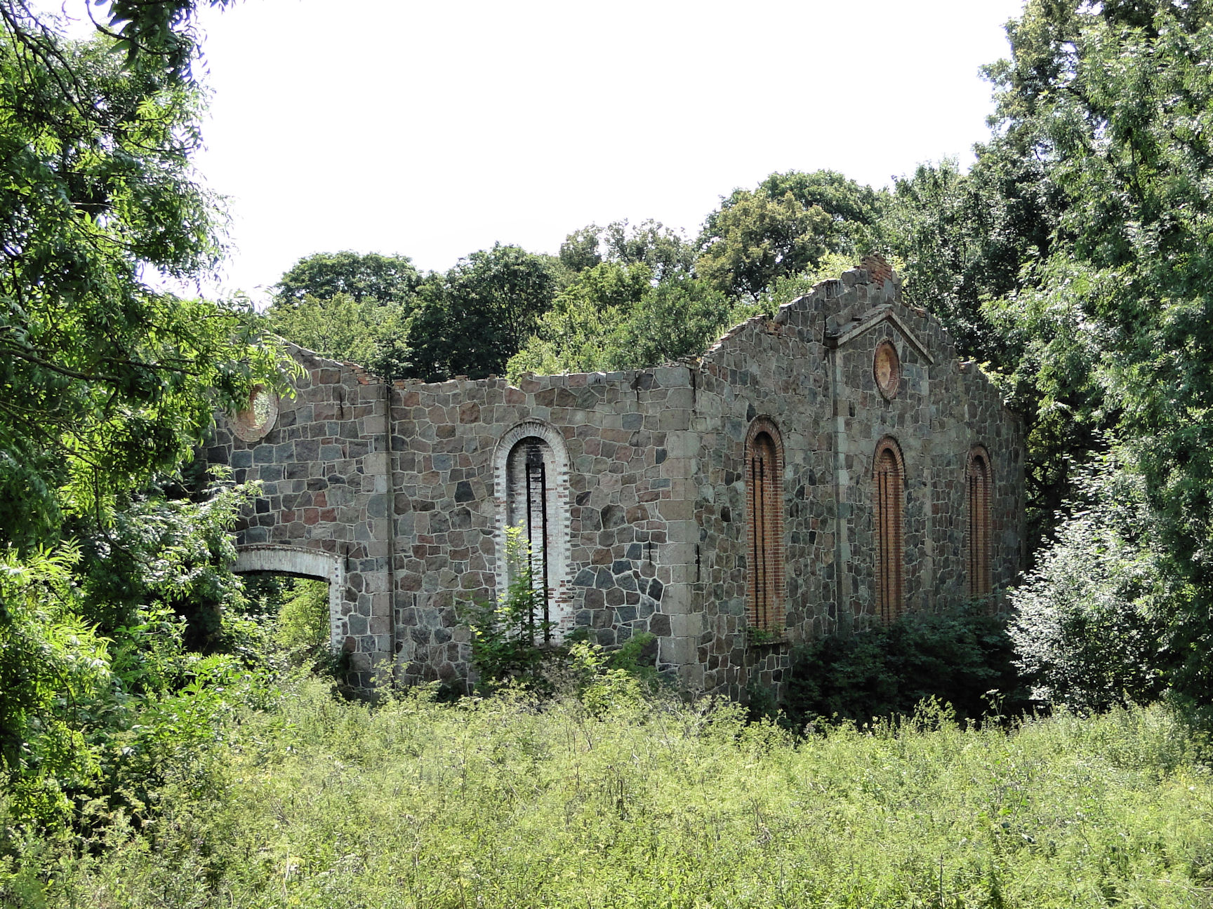 Ruina budynków gospodarczych w Kąkolewicach